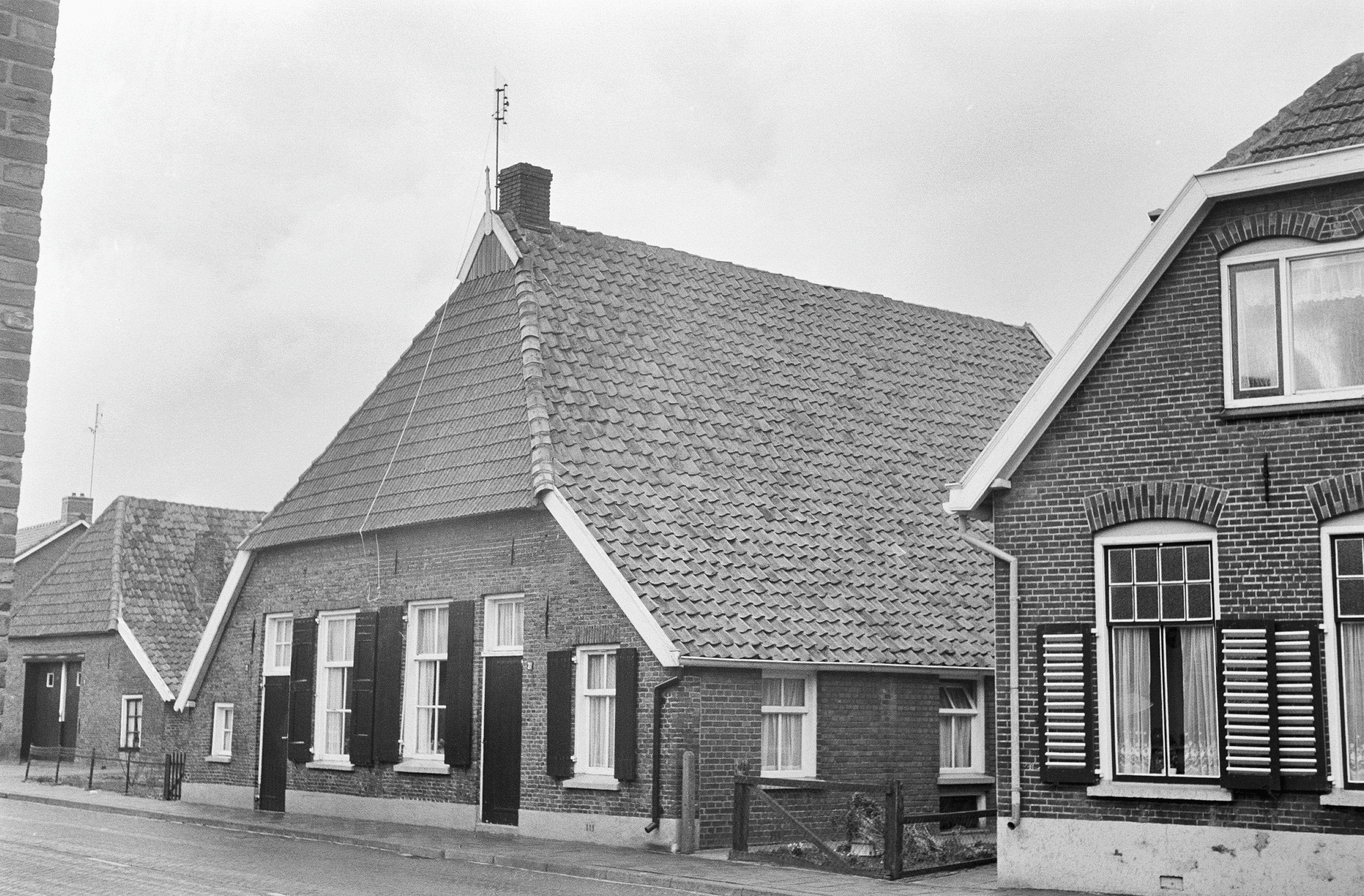 overzicht